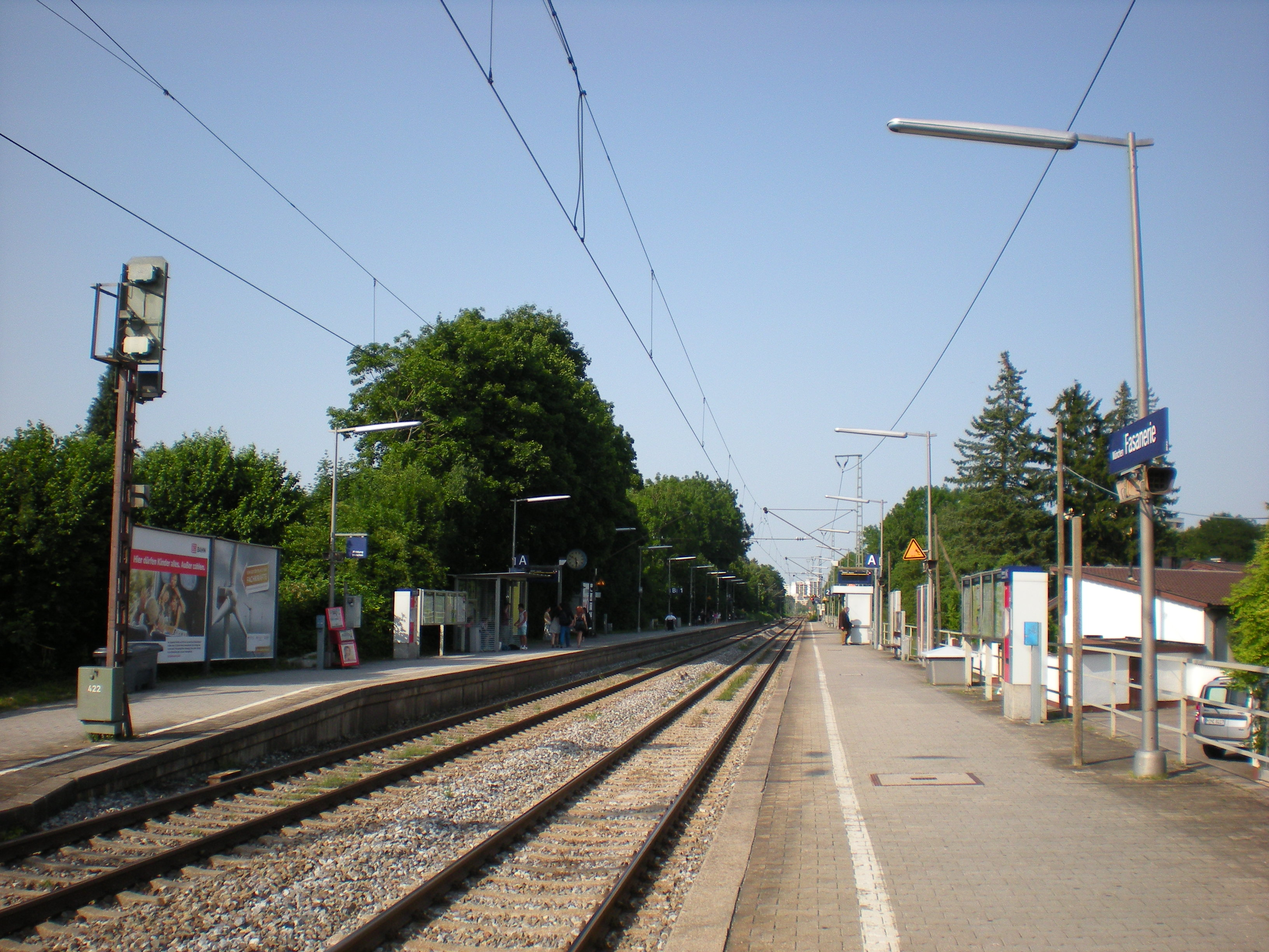 Bahnsteige des S-Bahnhofs München Fasanerie